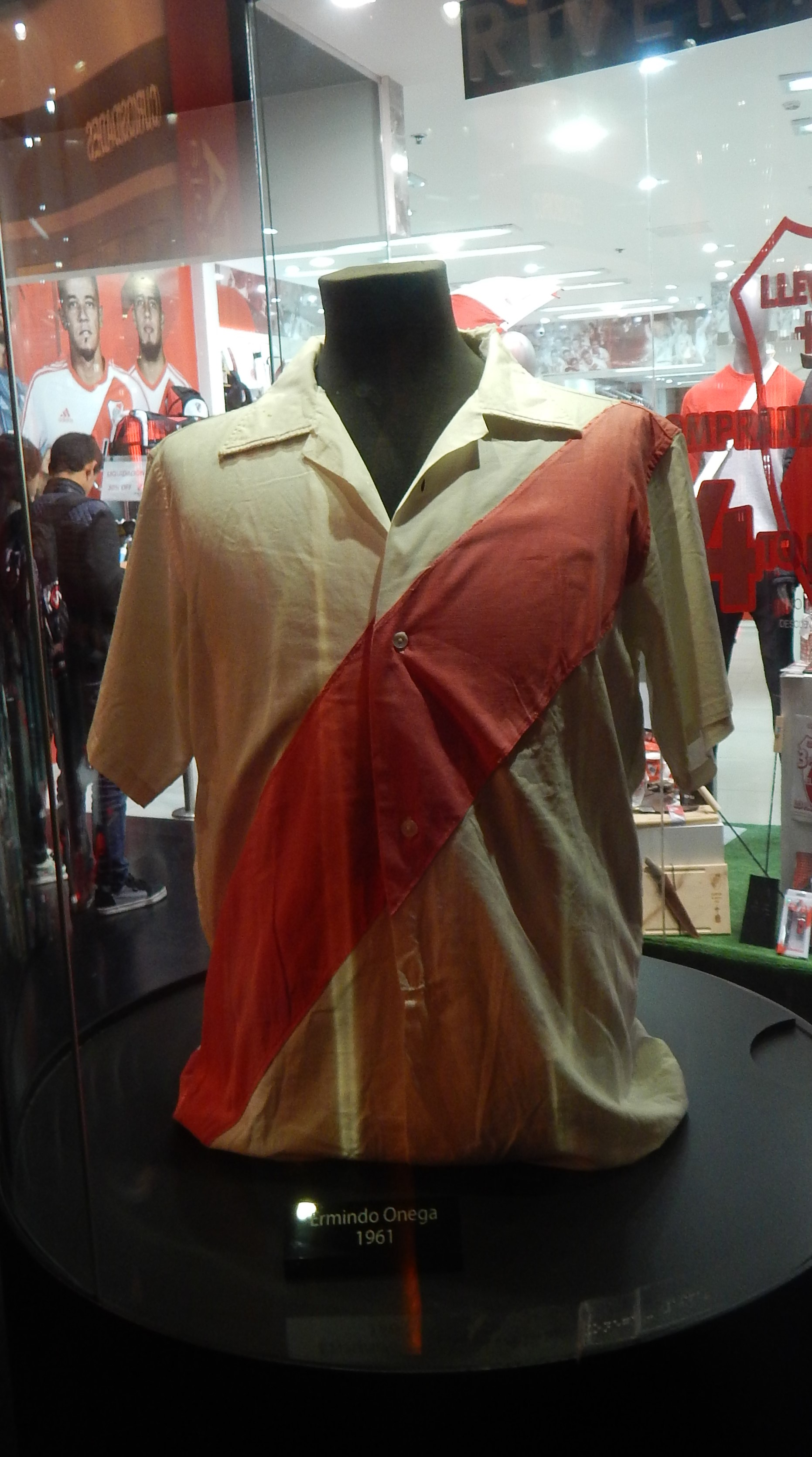 Camiseta de Ermindo Onega del Club Atlético River Plate de 1961, en el Museo River Plate.